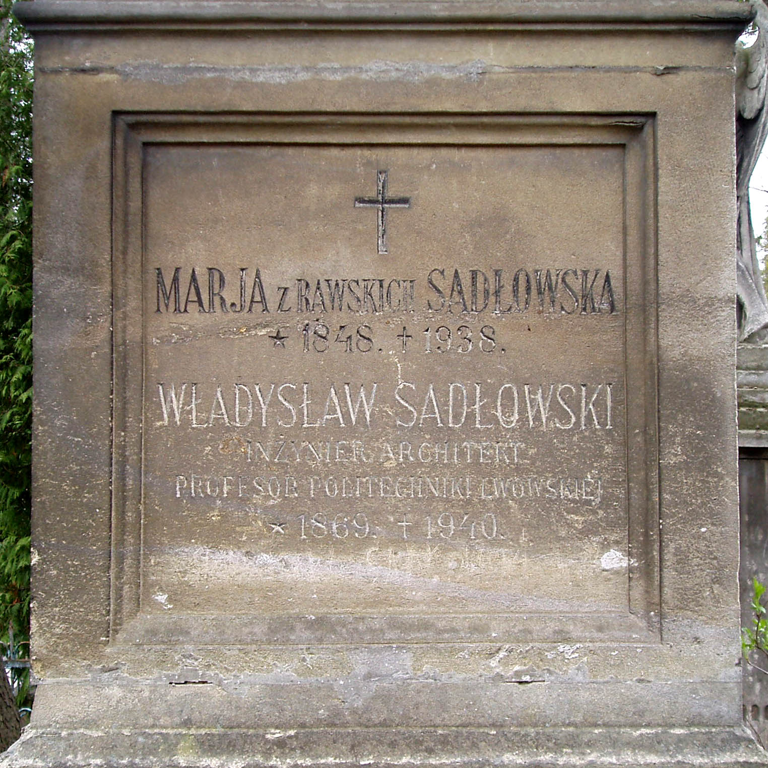 Гробівець родини Равських на Личаківському цвинтарі у Львові.